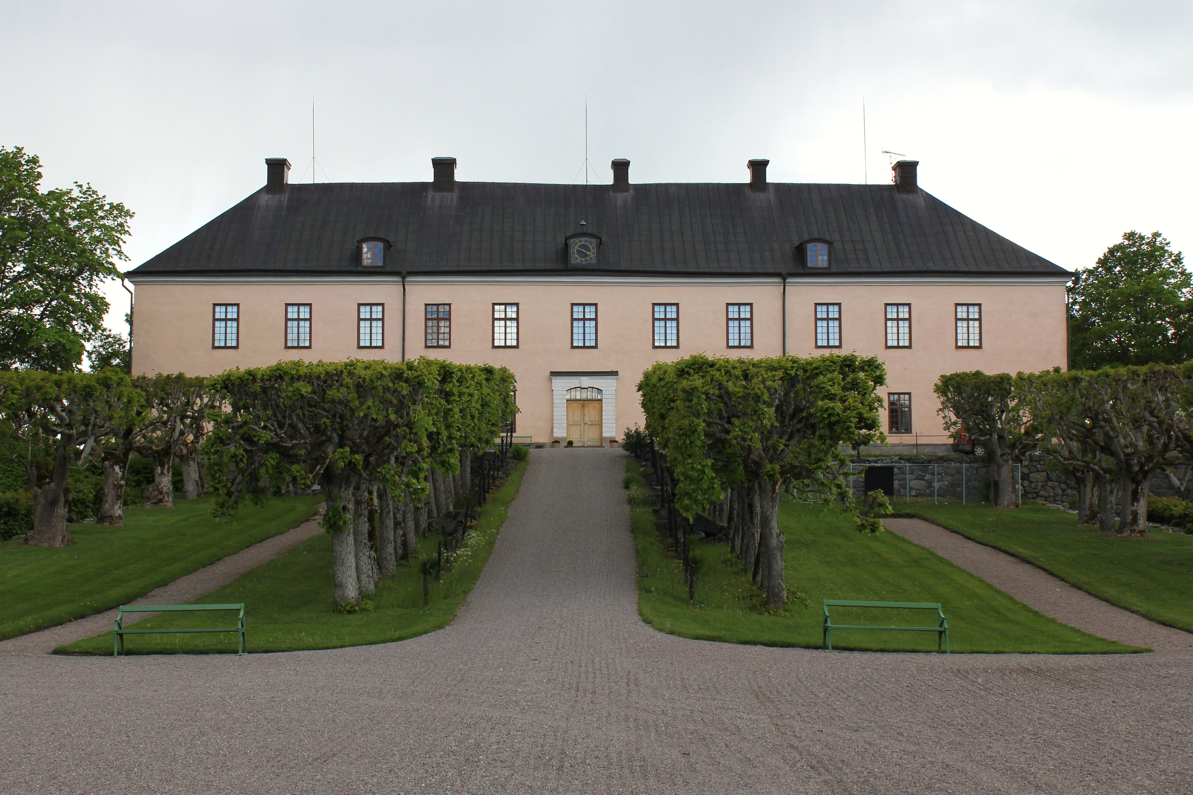 Grönsö slott, Enköpings kommun.